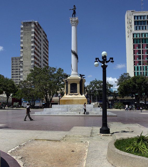 Foto de la Plaza Bolívar de la ciudad de Valencia.